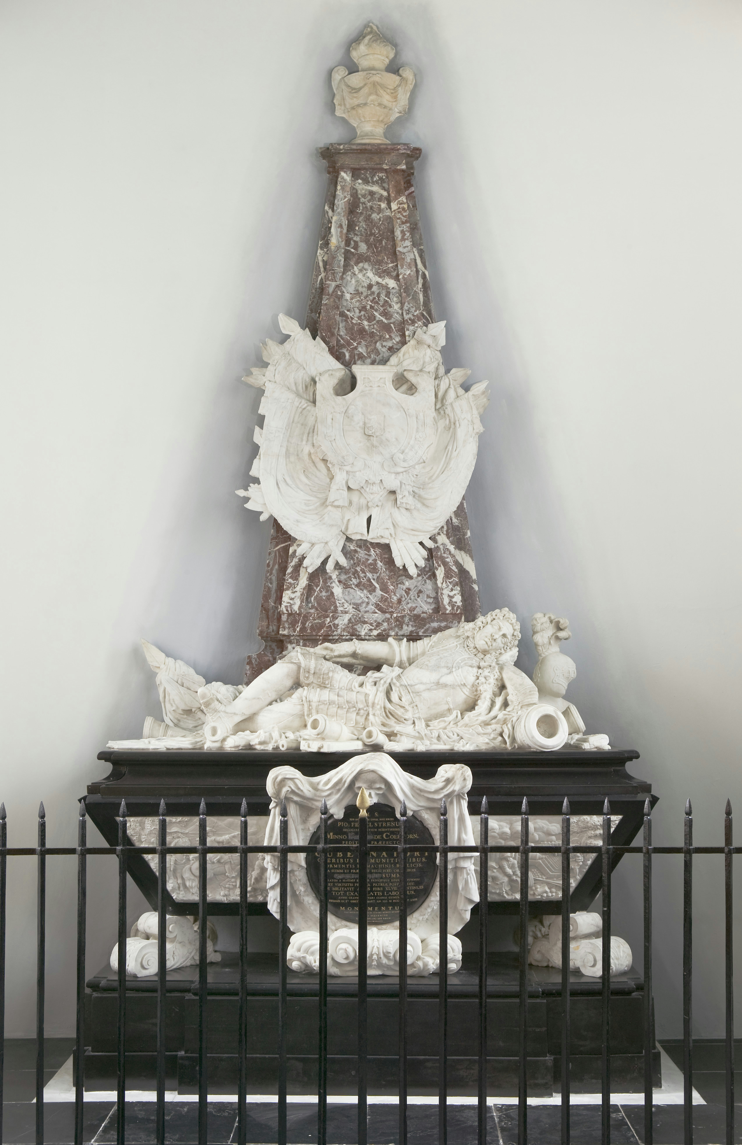 Nederlands Hervormde Kerk: Interieur, overzicht van het grafmonument Menno van Coehoorn na de restauratie, staat in het koor (opmerking: Opdracht t.b.v. RACM Nieuwsbrief (nr: 4 - juli 2008))